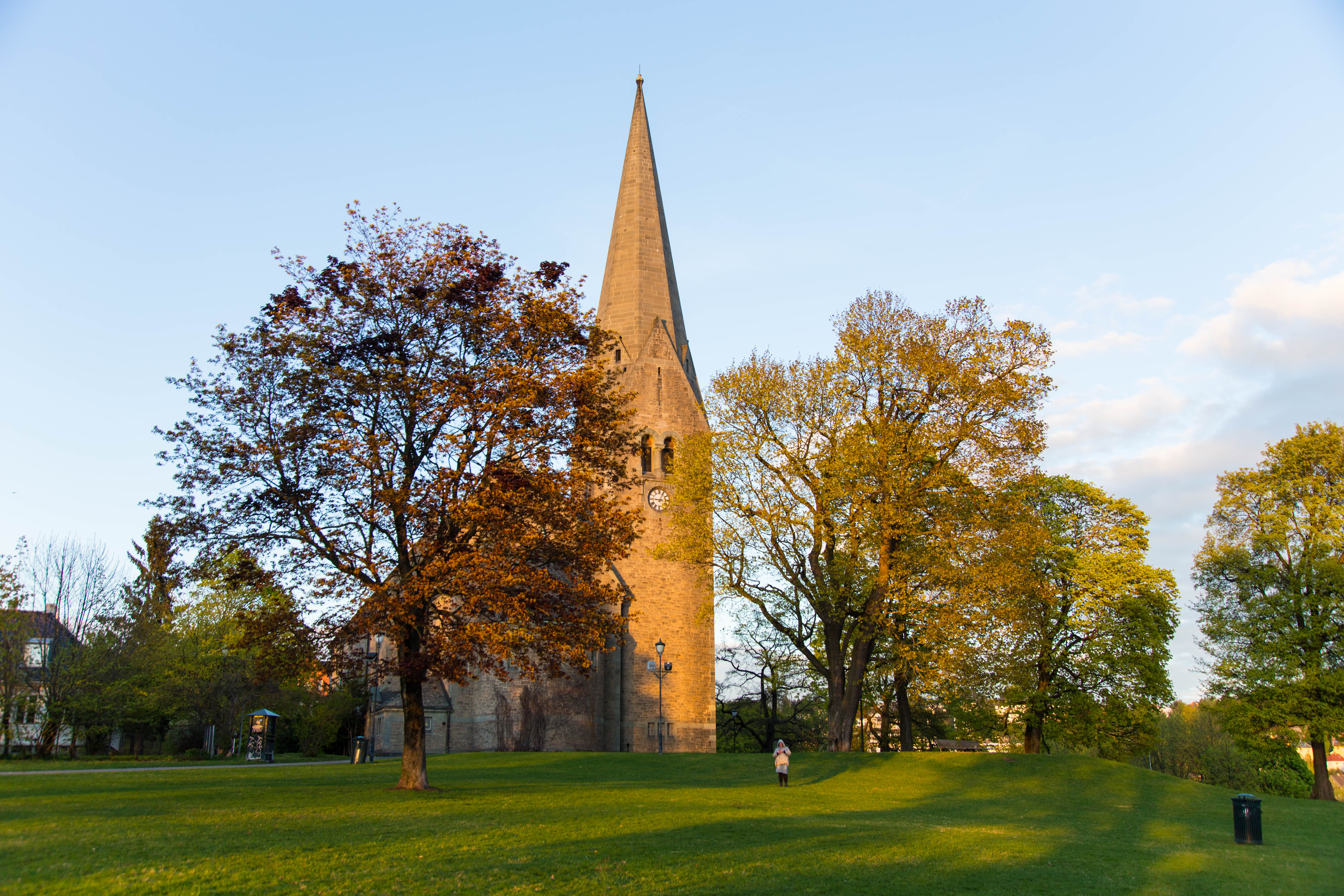 Vålerenga church in Oslo, Norway